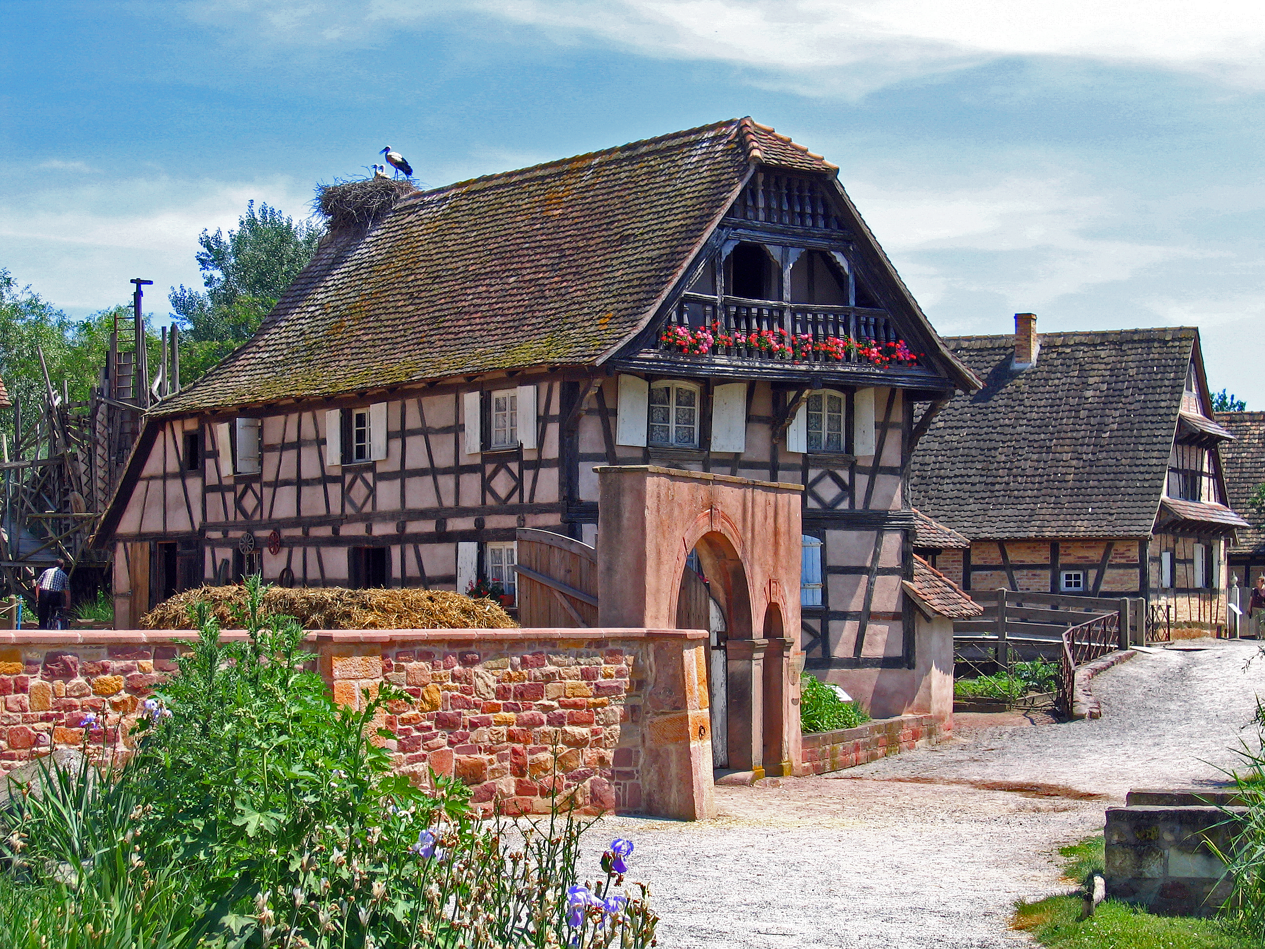 Architecture alsacienne - Ecomusée d'Alsace France ( J.P Daniel )